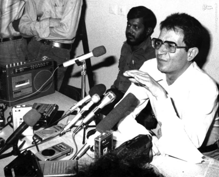 کنفرانس مطبوعاتی دکتر سید حسن آیت در پاسخ به نوار مشهور